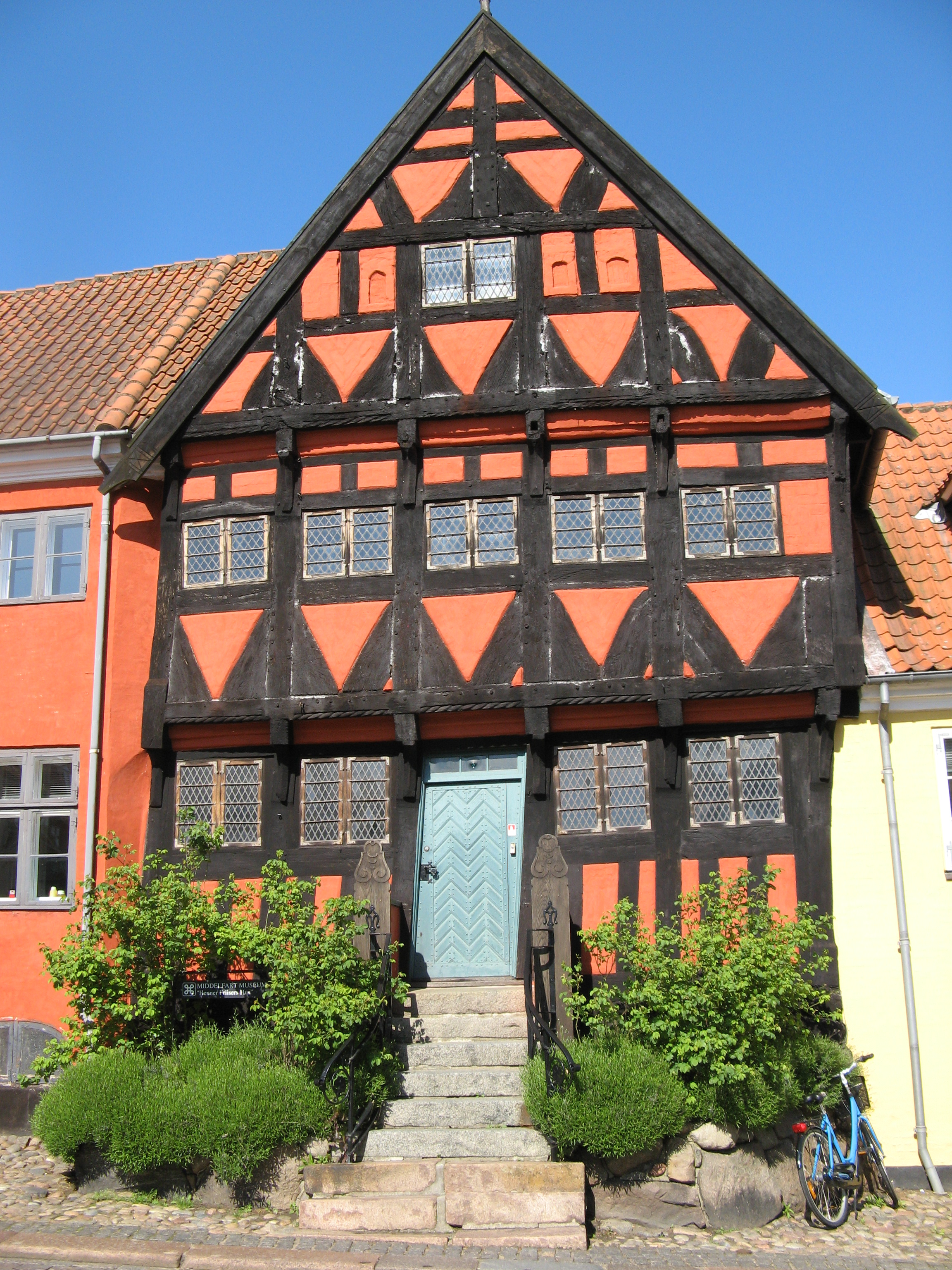 Old Building in Middelfart, Denmark